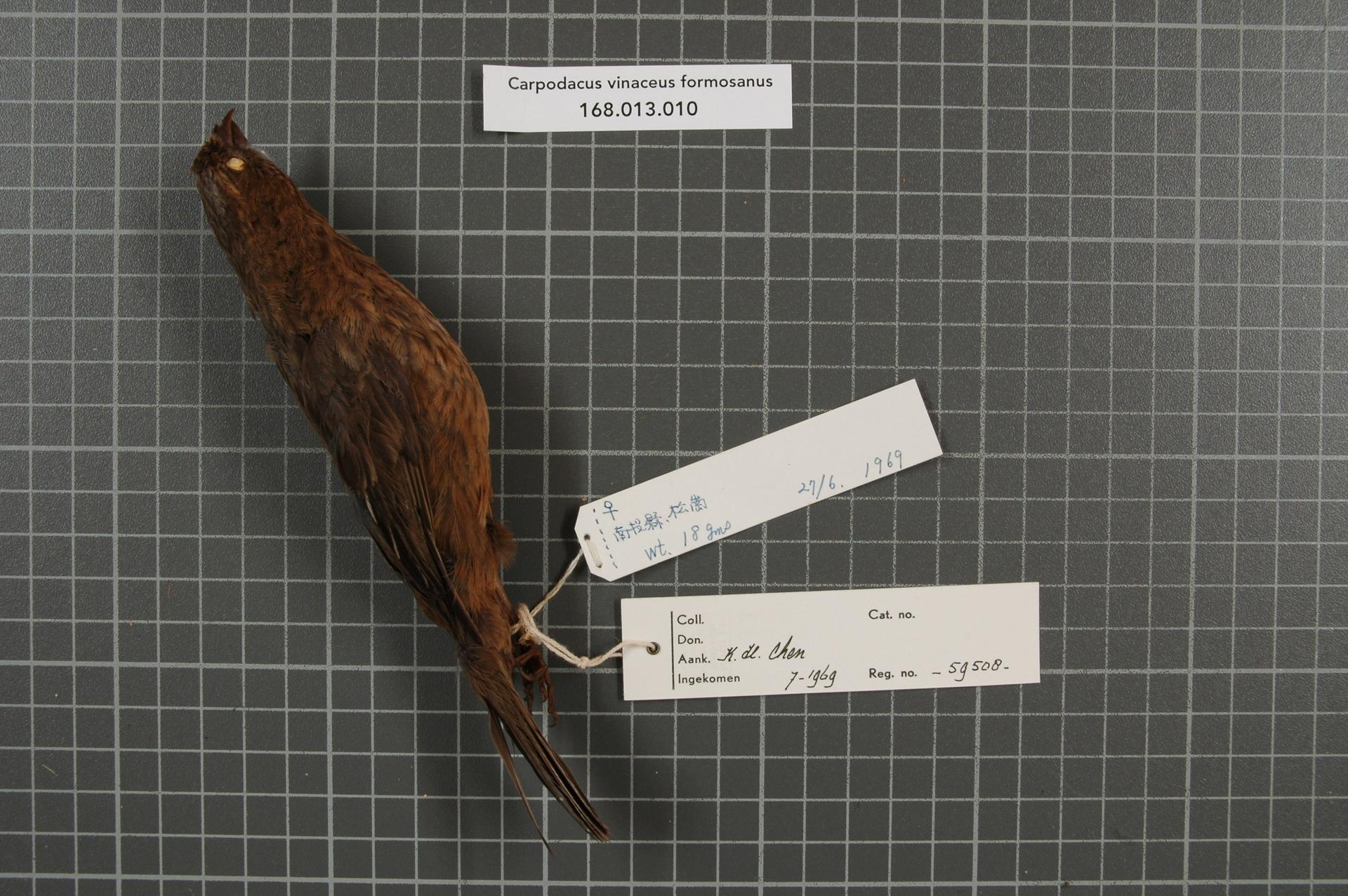 Carpodacus vinaceus formosanus Ogilvie-Grant, 1906